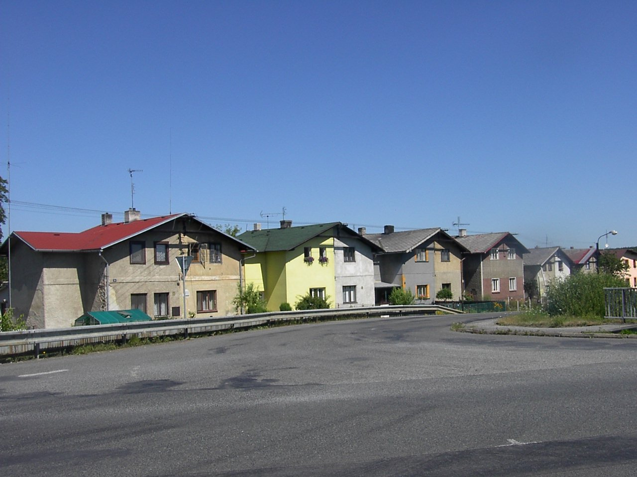 Worker houses in Karez.